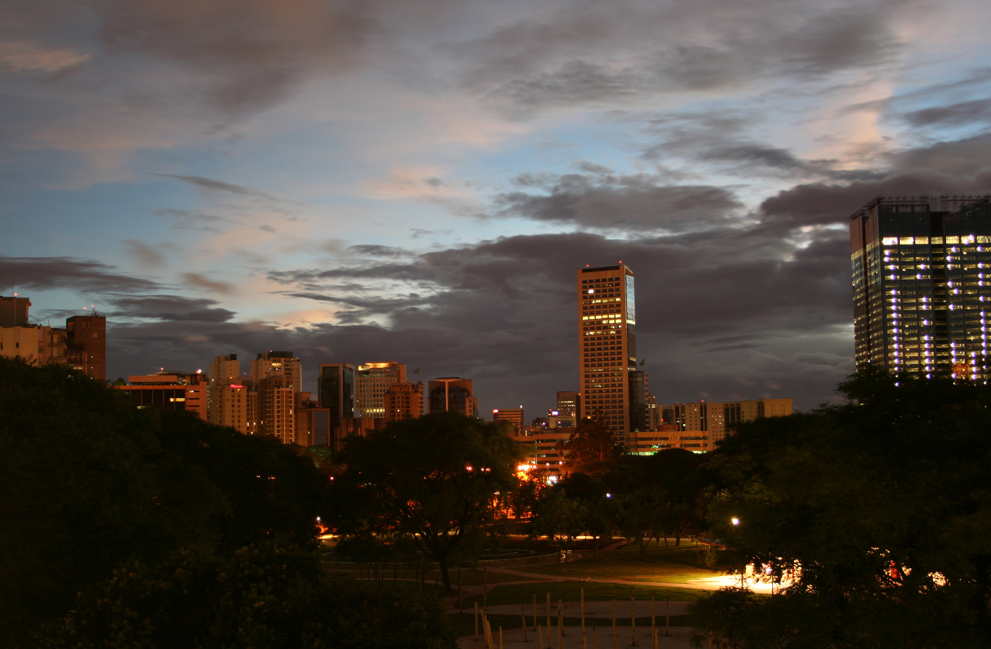 Parque do Povo de noite.